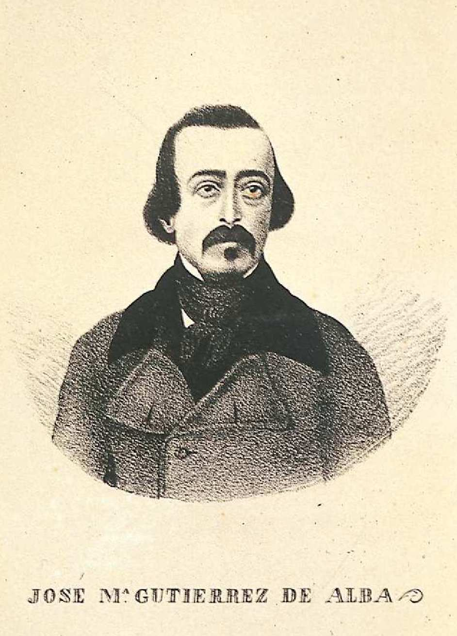 José María Gutiérrez de Alba, litografía. Biblioteca Nacional de España.